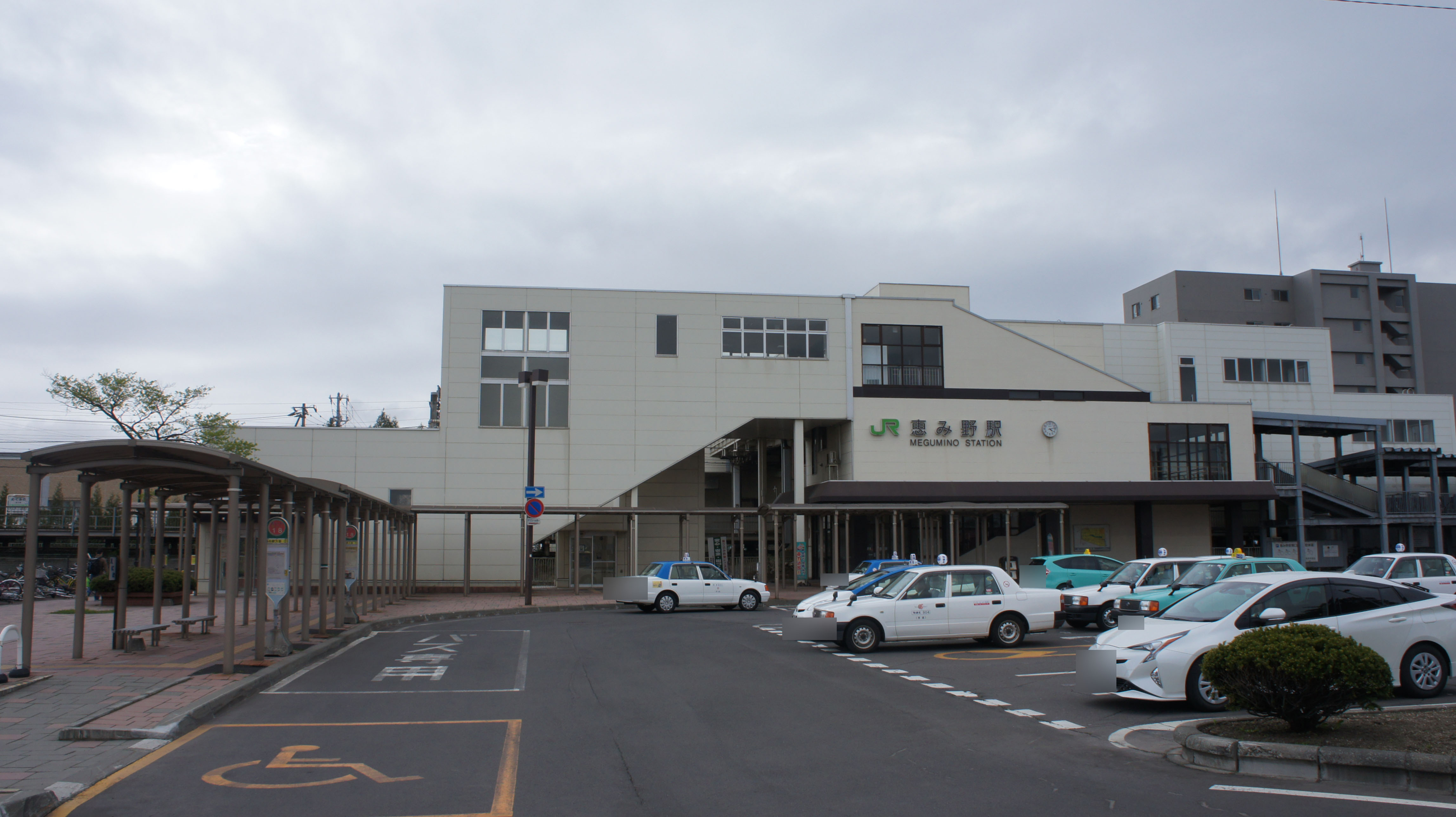 JR千歳線・恵み野駅の駅舎（東口） Sony NEX-3